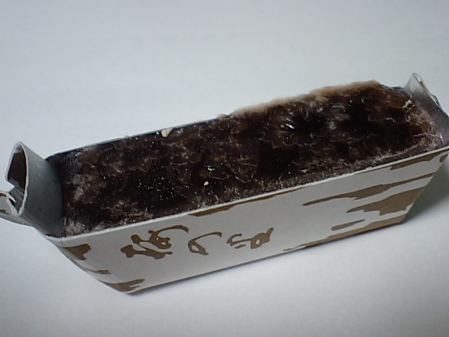 岡山銘菓 高瀬舟羊羹